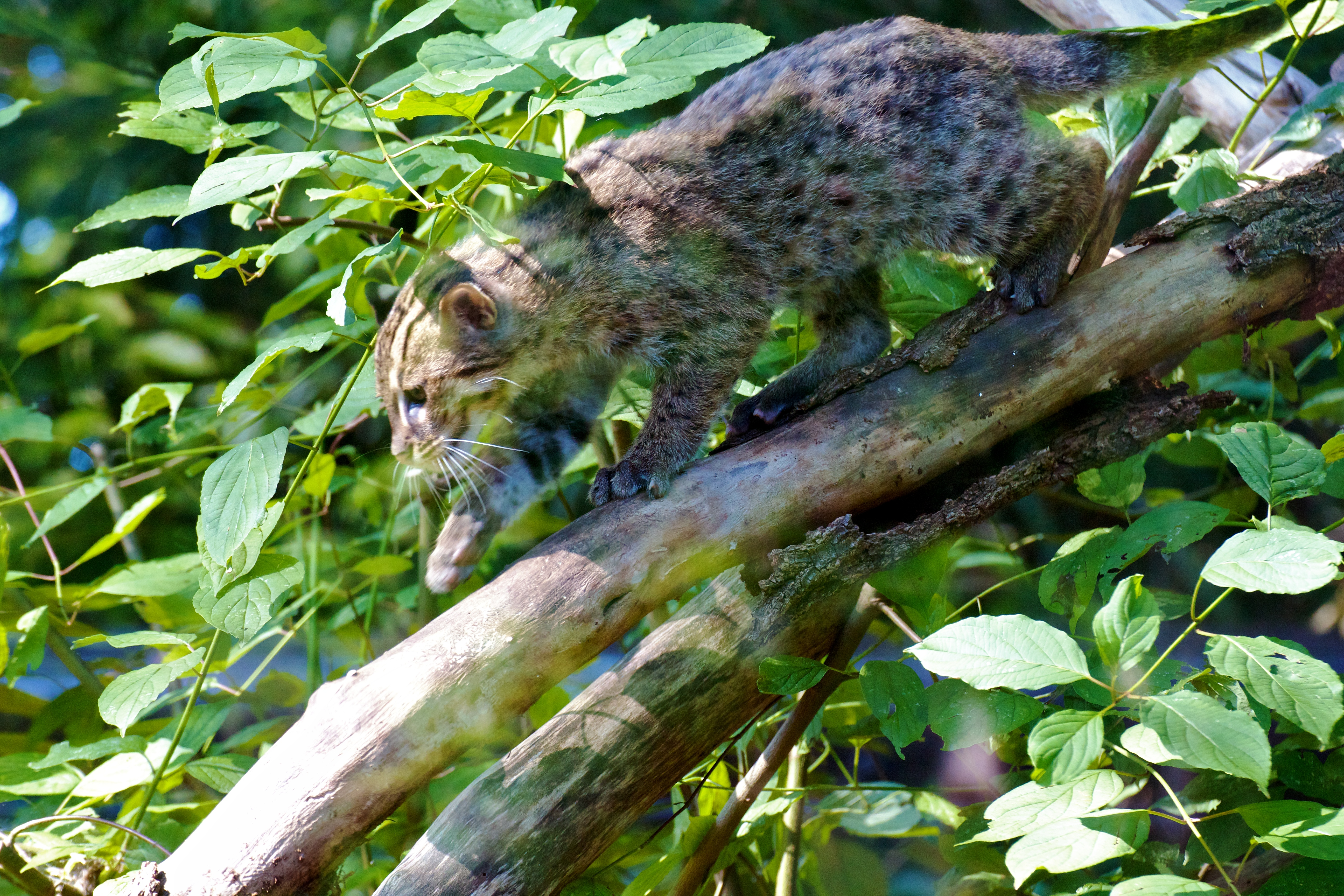 Un jeune Chat pêcheur (Prionailurus viverrinus) sur une branche.